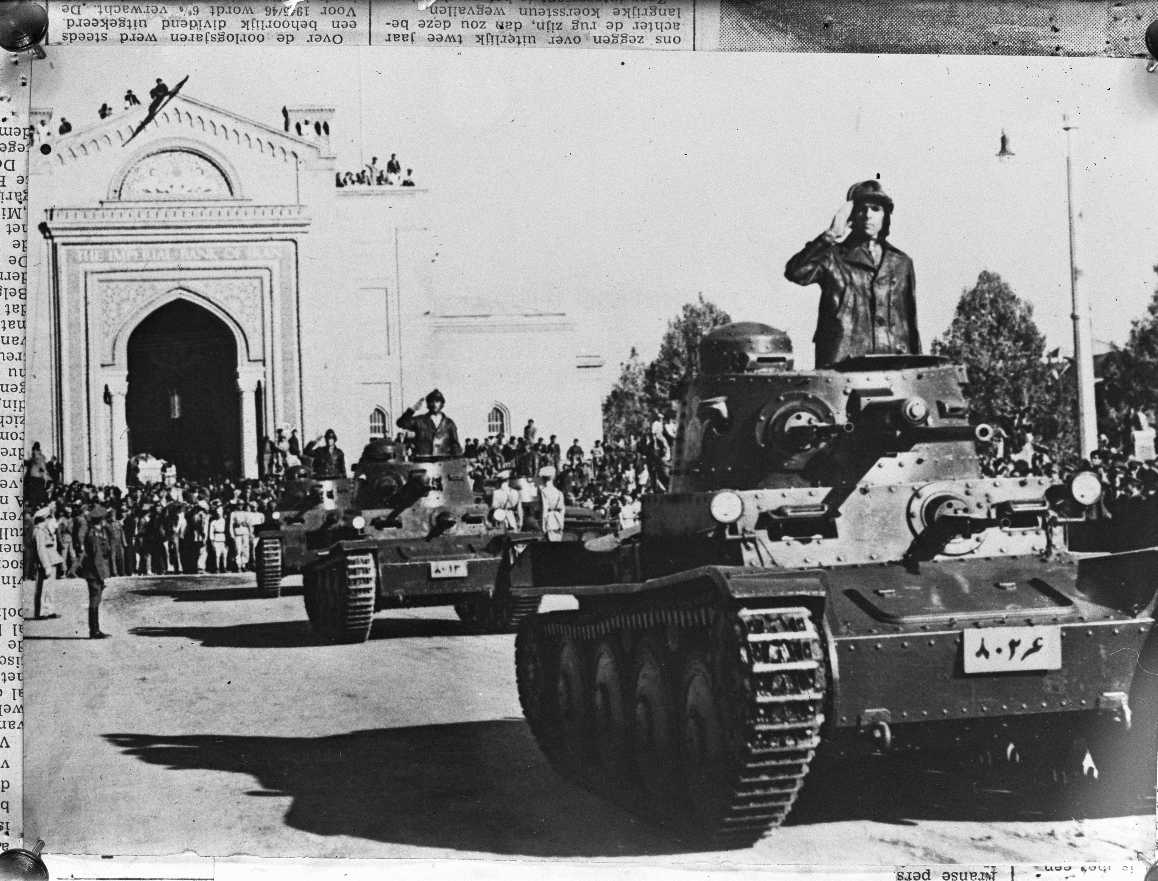 Collectie / Archief : Fotocollectie Anefo Reportage / Serie : [ onbekend ] Beschrijving : Azerbeidsjan capituleert Datum : 15 december 1946 Locatie : Azerbeidzjan Fotograaf : Agence France Presse (AFP) Auteursrechthebbende : Nationaal Archief Materiaalsoort : Glasnegatief Nummer archiefinventaris : bekijk toegang 2.24.01.09 Bestanddeelnummer : 901-9710